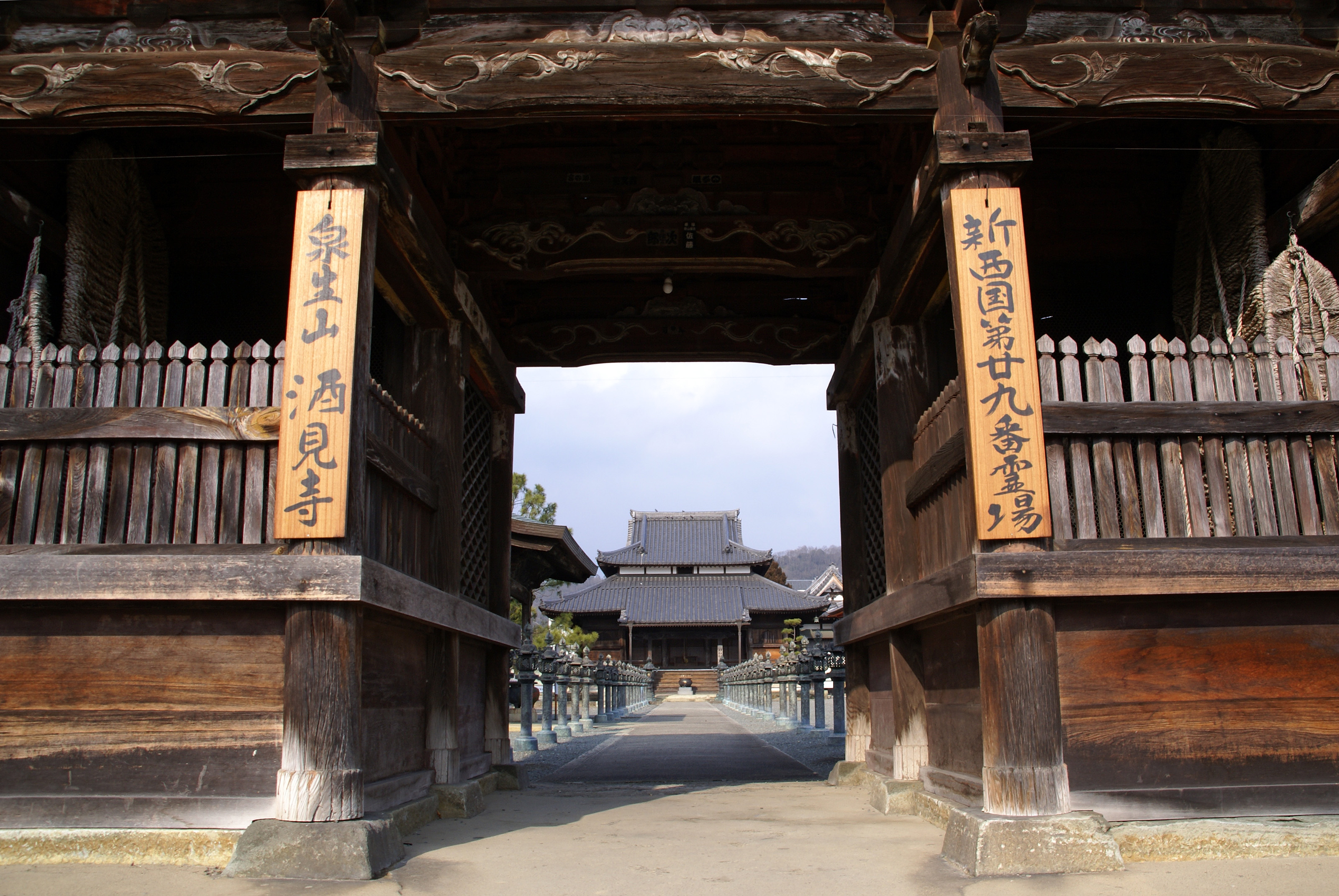 Sagamiji in Kasai, Hyogo, Japan